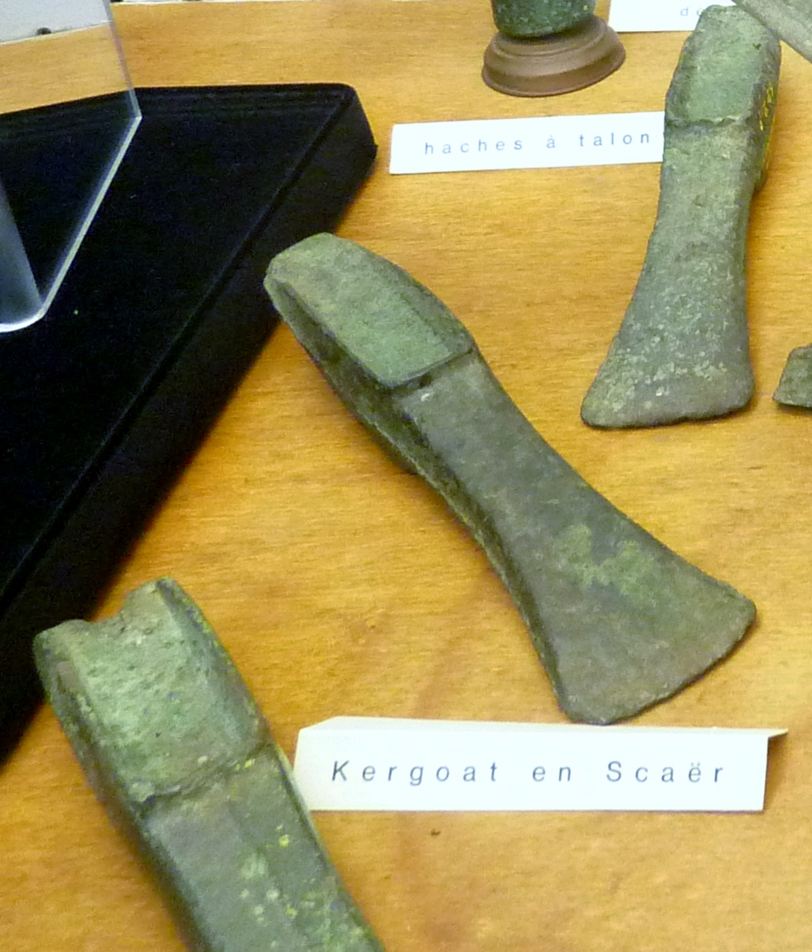 Haches à talon trouvées à Kergoat en Scaër et datant de l'âge du bronze moyen (Musée de la préhistoire finistérienne de Penmarc'h)